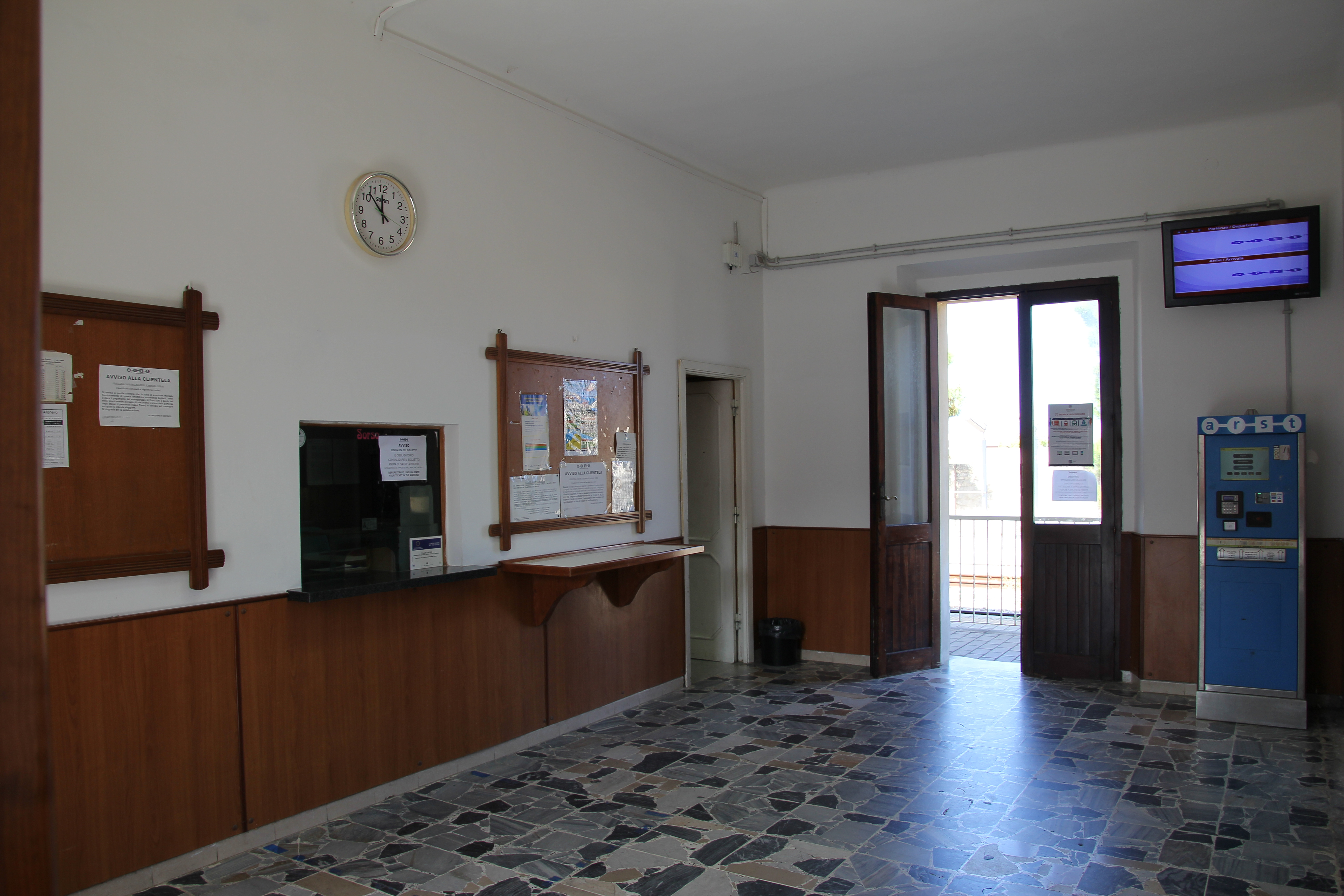 Sorso, stazione ferroviaria